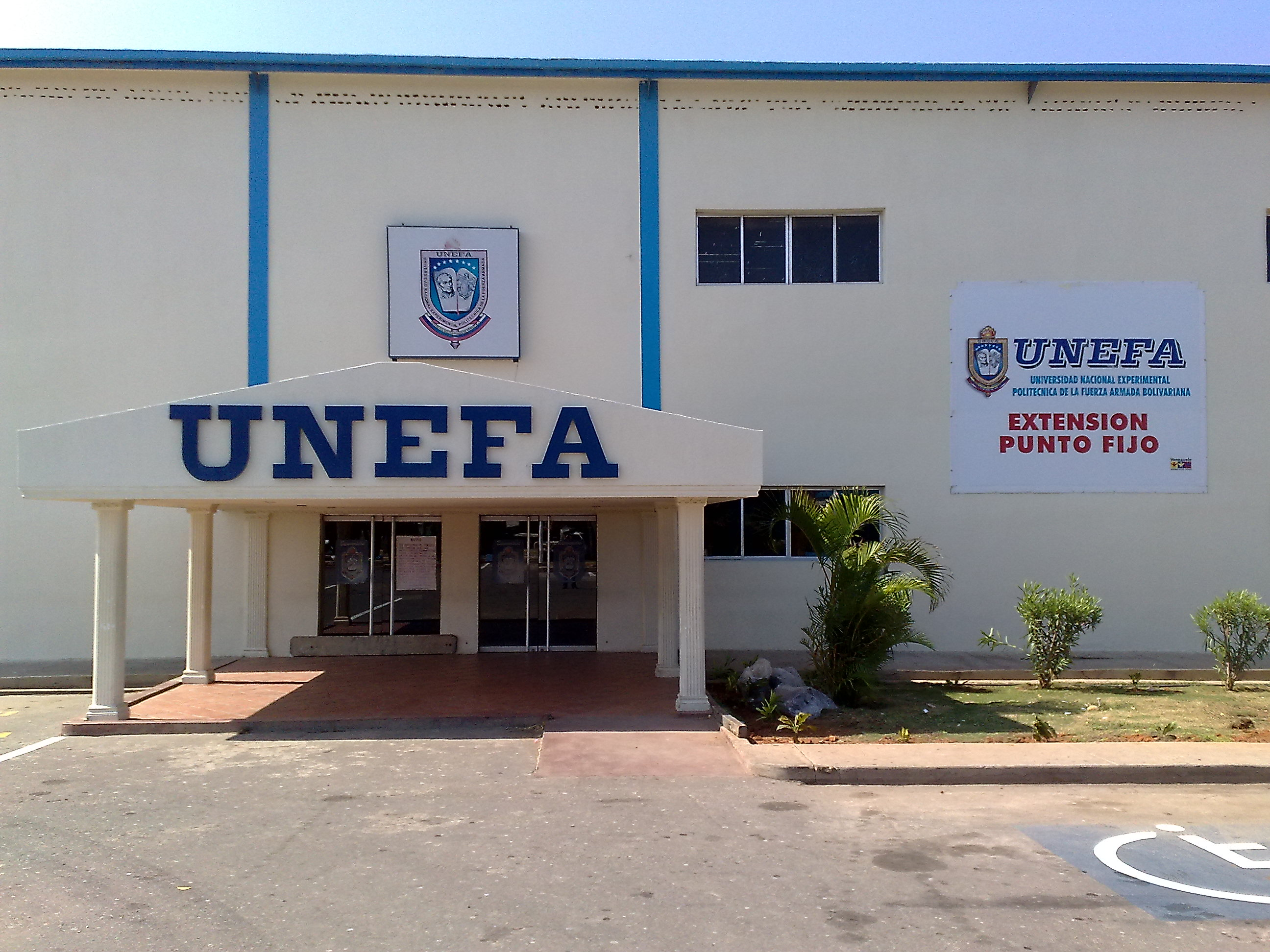 Entrada de la Universidad Nacional Experimental Politécnica de la Fuerza Armada Bolivariana – Extensión Punto Fijo.